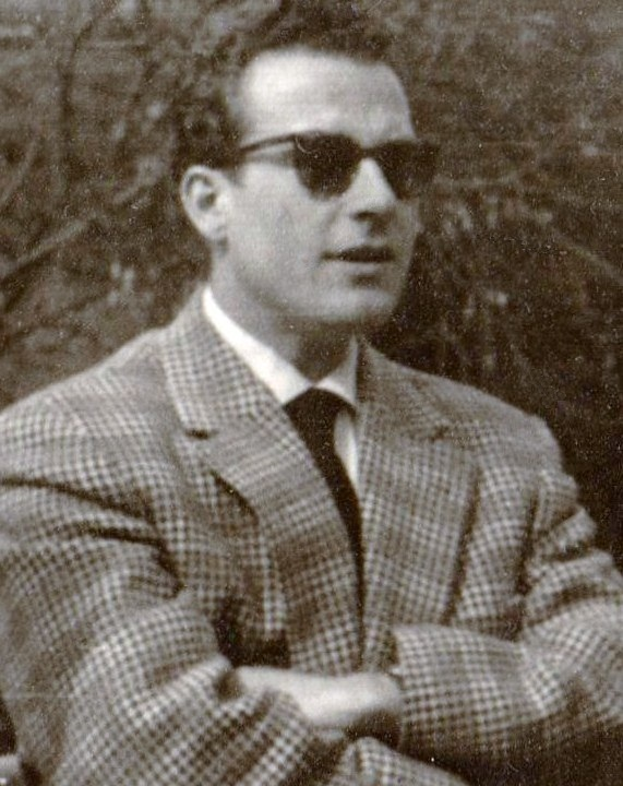 Egon Joppen, Sieger der Hessenmeisterschaft im Schach, 1956 in Bad Kreuznach.